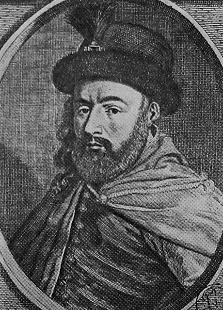 Gheorghe Racoczy I